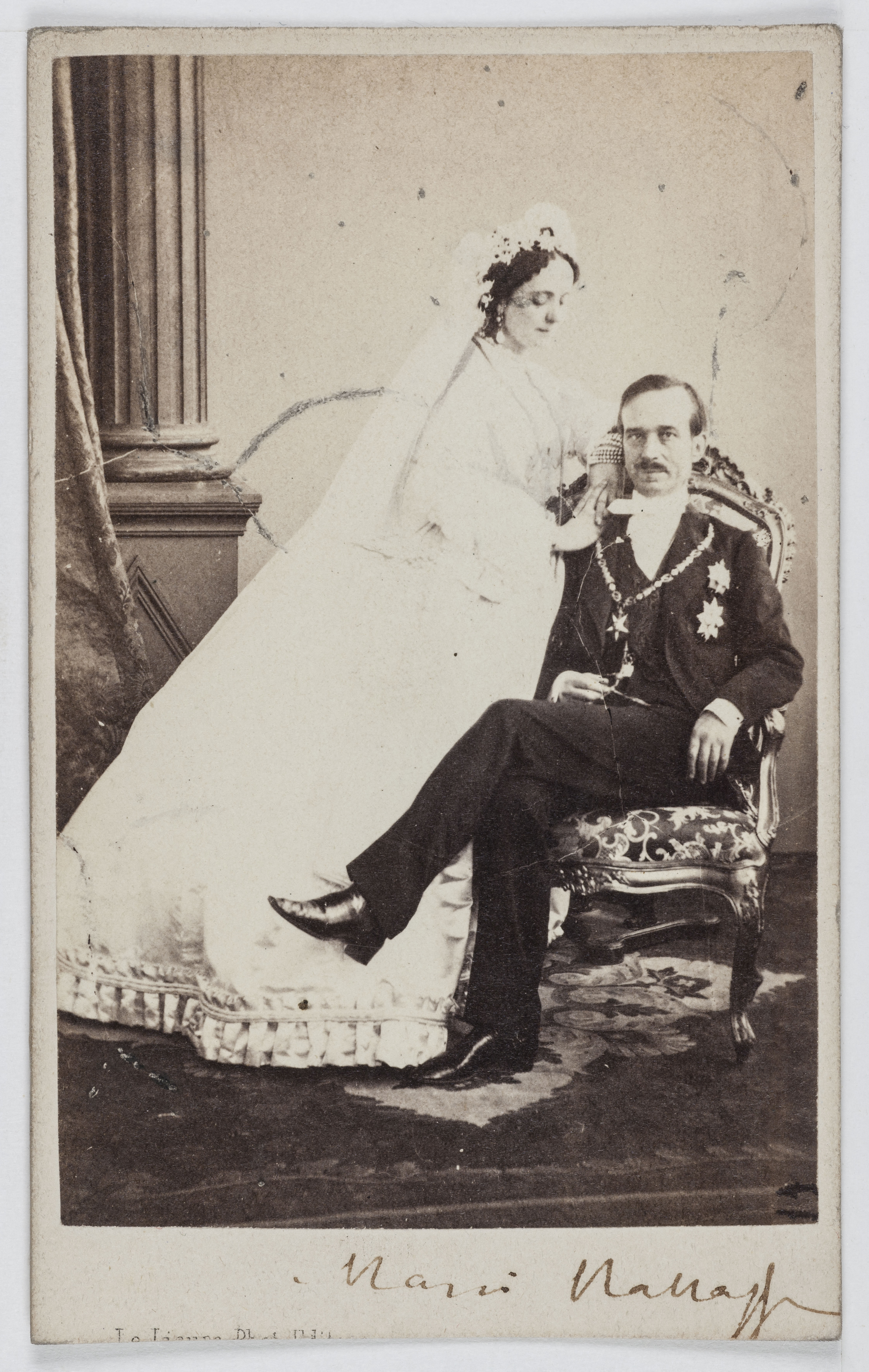 Photographie par Henri Le Lieure de Marie-Lætitia Bonaparte-Wyse et son mari Urbano Rattazzi, conservée au Musée Carnavalet à Paris